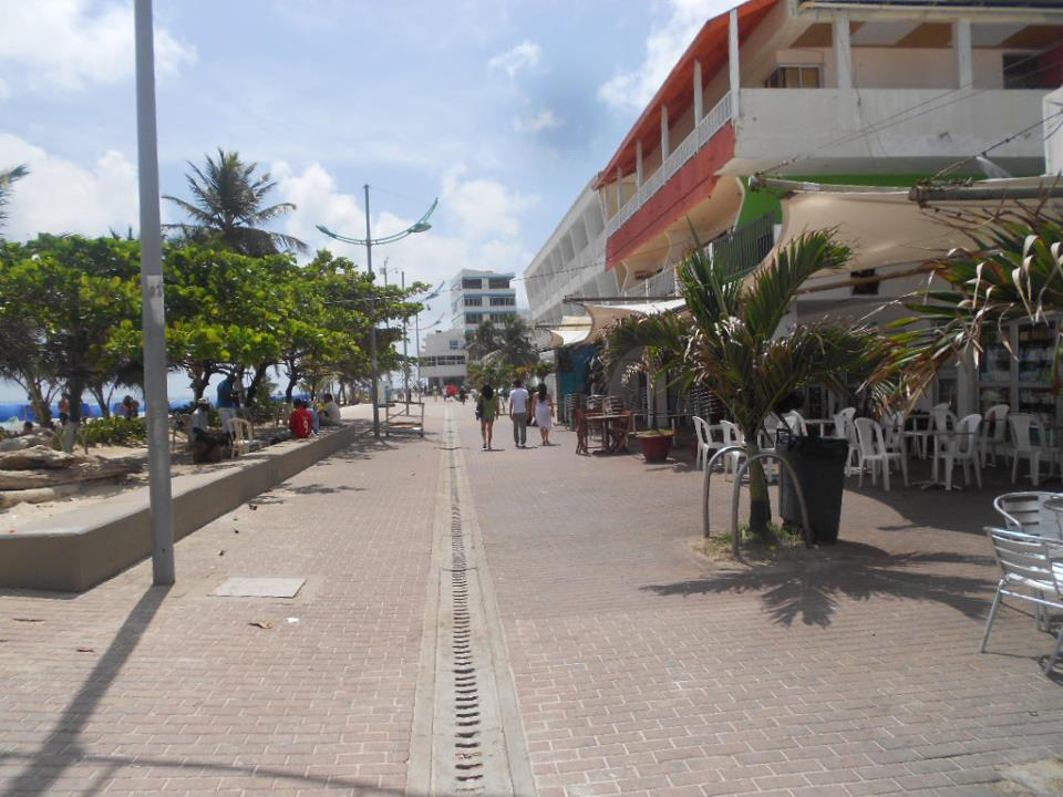 Paisaje típica de San Andrés, Colombia.